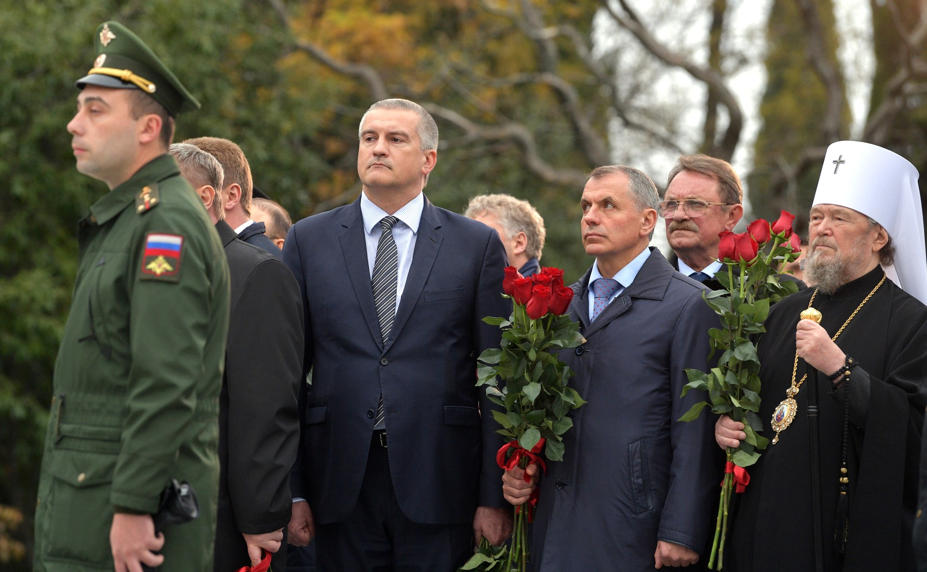 На церемонии открытия памятника Александру III. Крым, парк Ливадийского дворца.